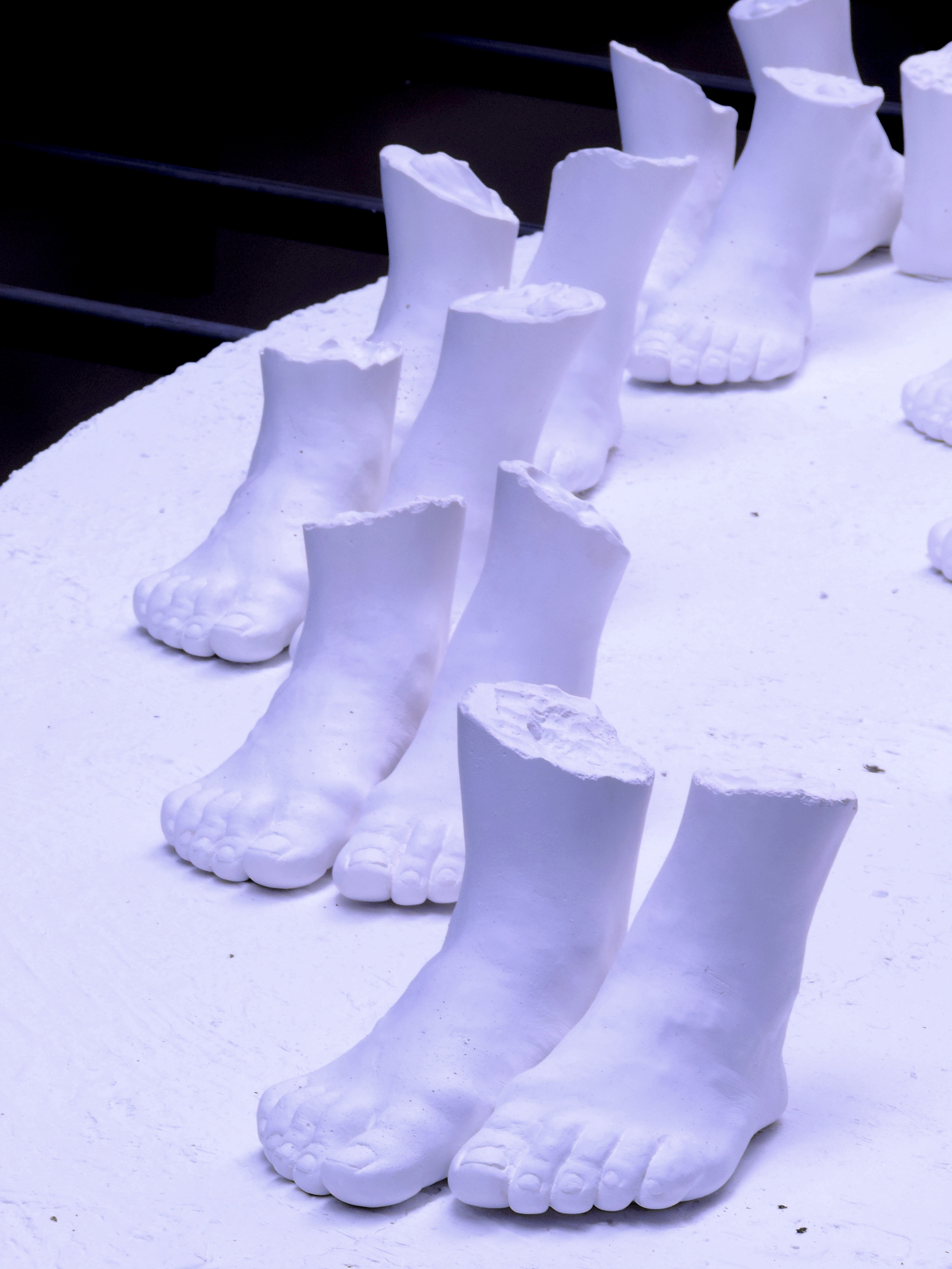 Zone: Centre Easton de Montréal Installation Exode est un hymne face aux horreurs de l’actualité, un hommage à la présence des absents, de ceux dont on ne se rappelle ni le nom ni l’histoire, de ceux dont on n’a pas écouté les gémissements. Des pieds qui ne disent ni la vie ni la mort, juste une partie d’une existence, juste l’empreinte inachevée d’un déracinement.